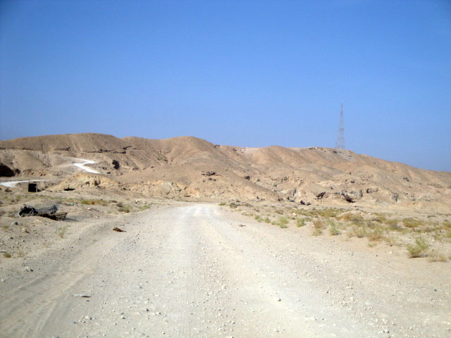 جبل سنام في سفوان في البصرة العراق